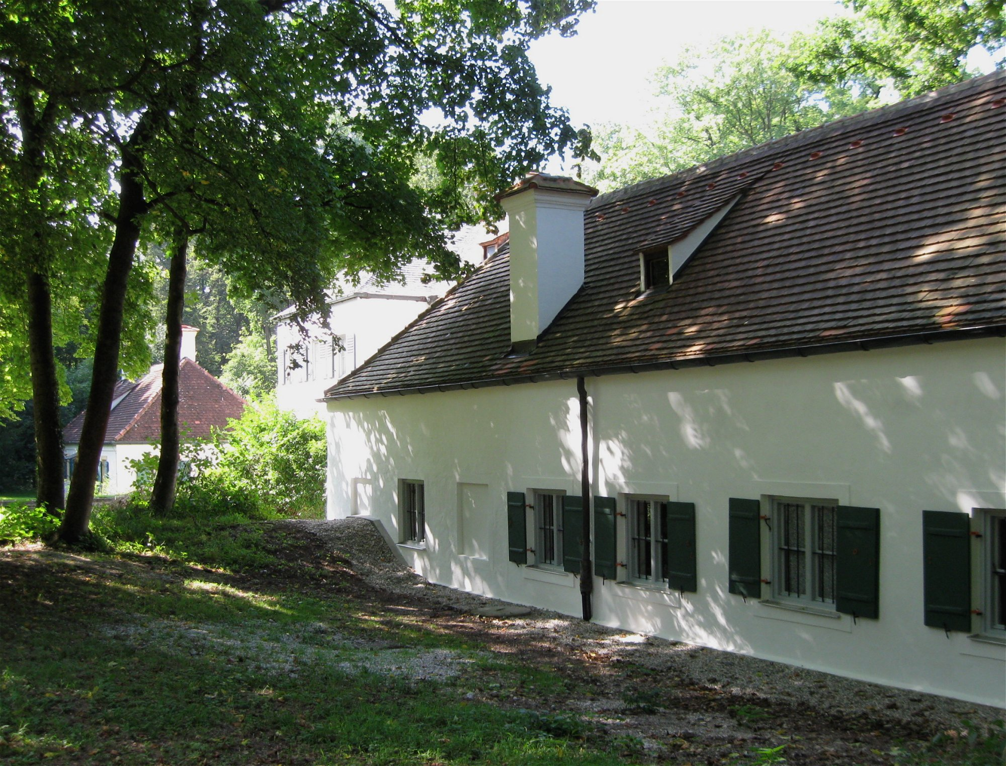 Schlosspark Nymphenburg: Das Dörfchen, Hirschgartenbrunnhaus